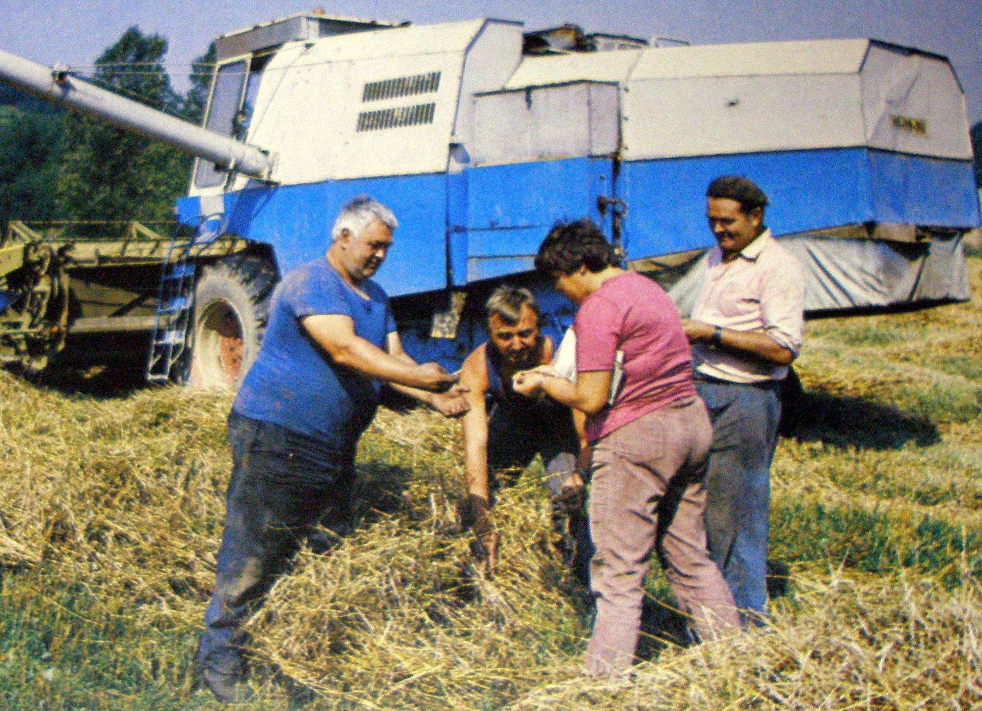 Družstevní roľníci a ich mechanizácia JRD Sedlice, rok 1986